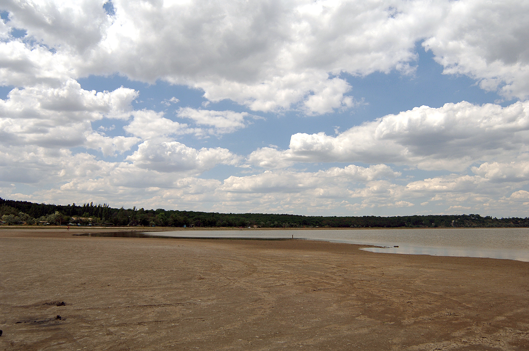 Молочный лиман в посёлке Богатырь Акимовского района Запорожской области